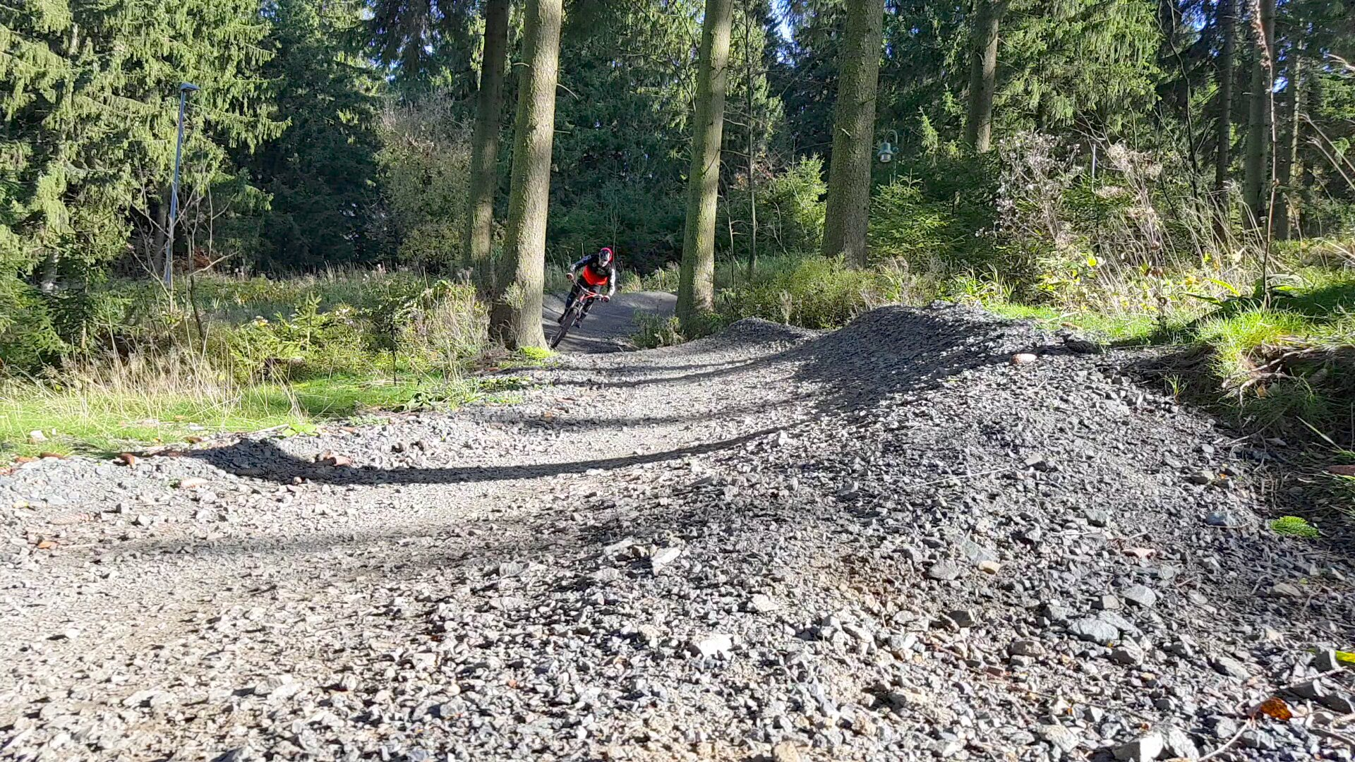 Typischer Flow Trail mit Anlieger.